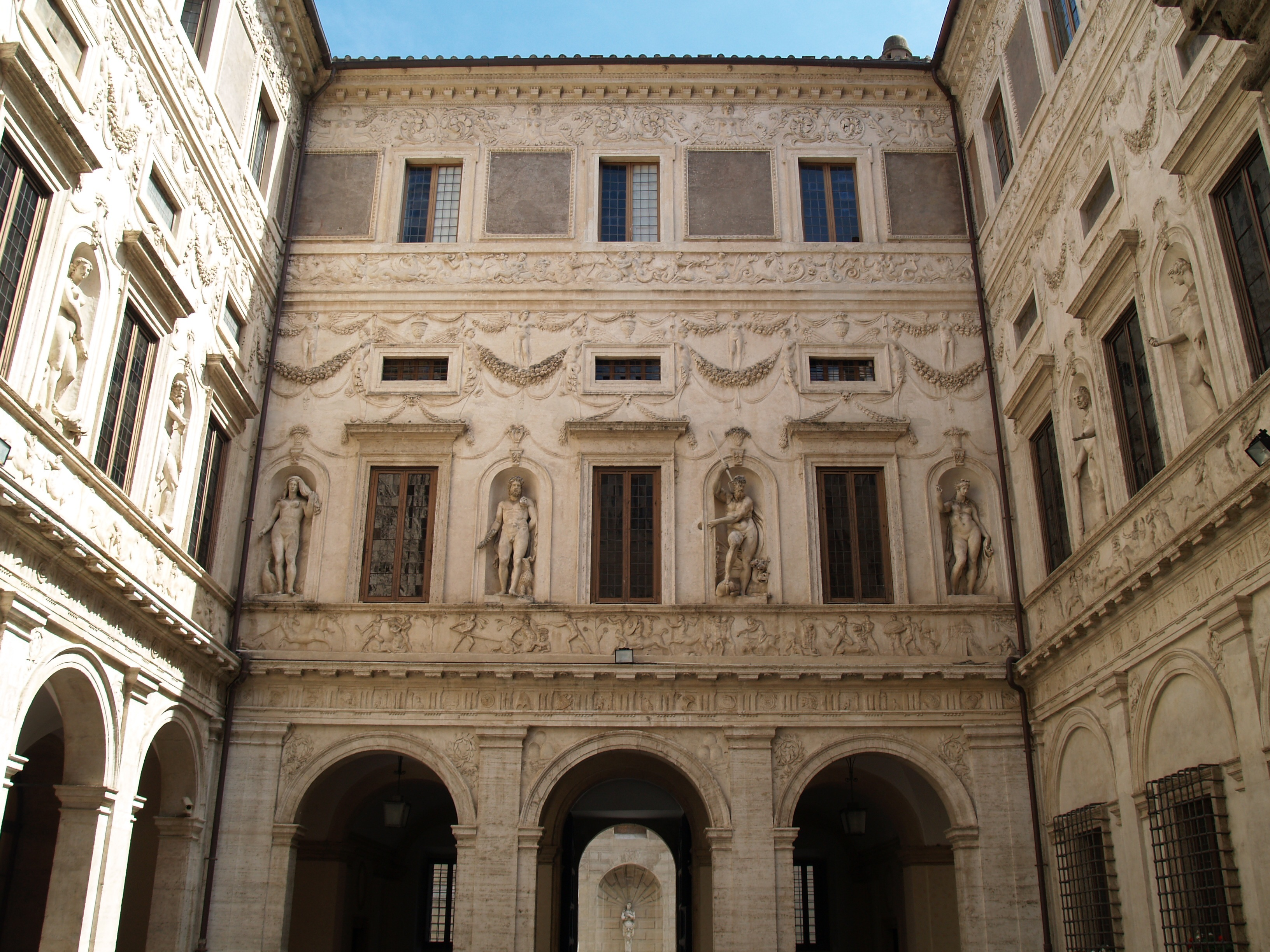 Roma, Palazzo Spada. Patio.